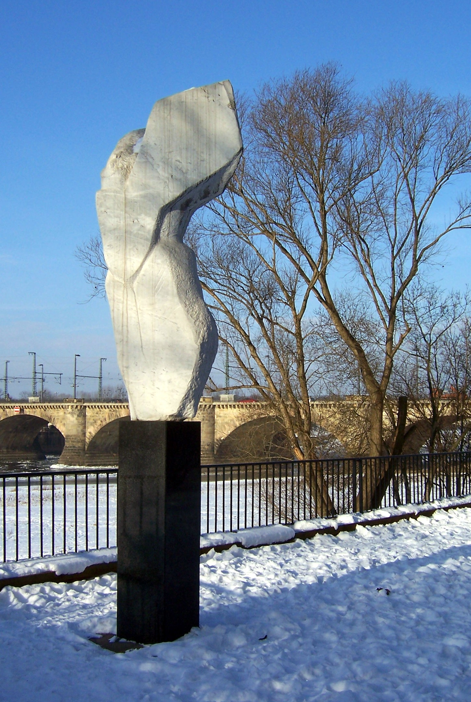 Marmorskulptur Sich befreien von Charlotte Sommer-Landgraf im Palaisgarten, Dresden.